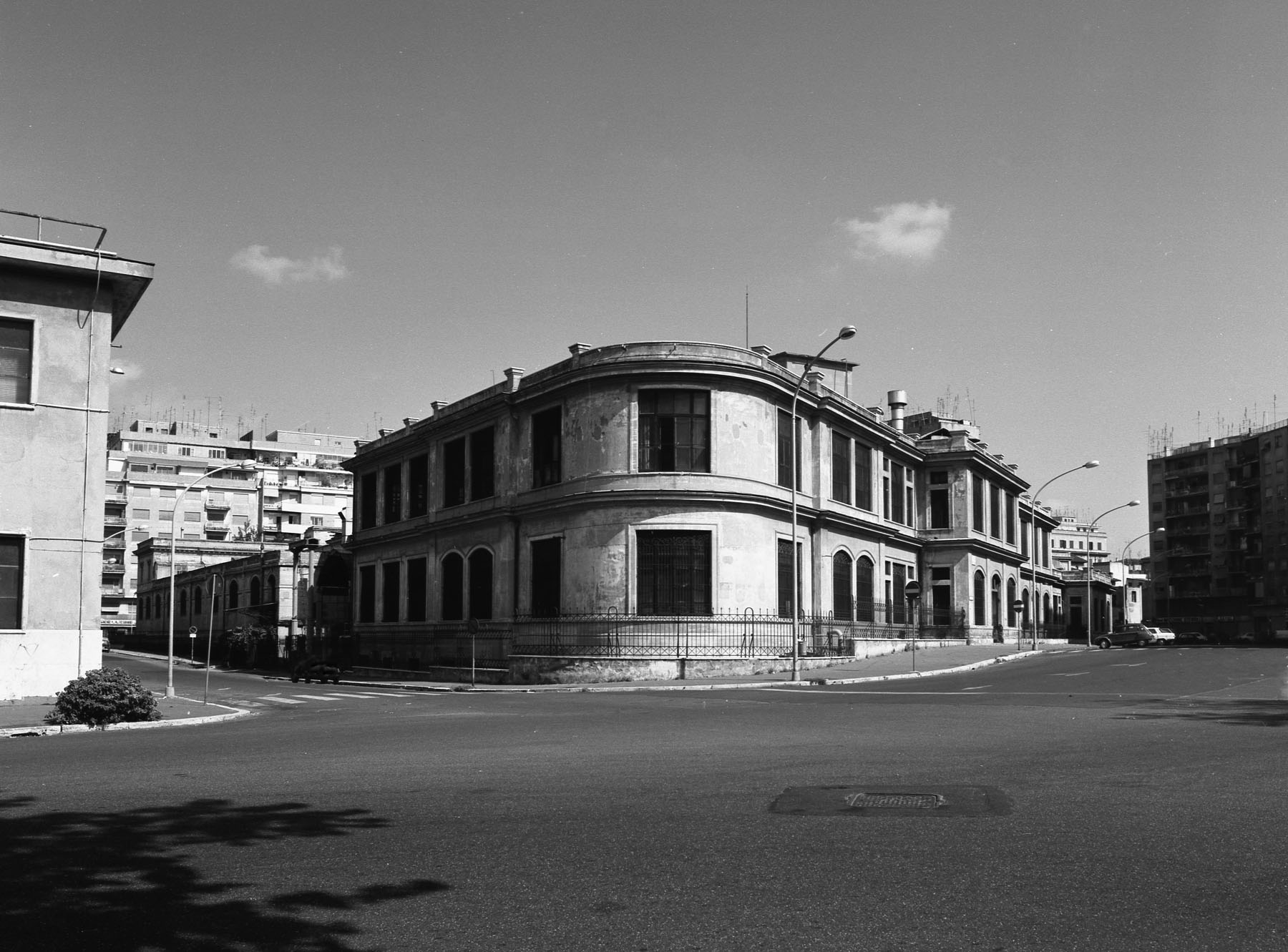 Il Poligrafico dello Stato di via G. Capponi (1985)